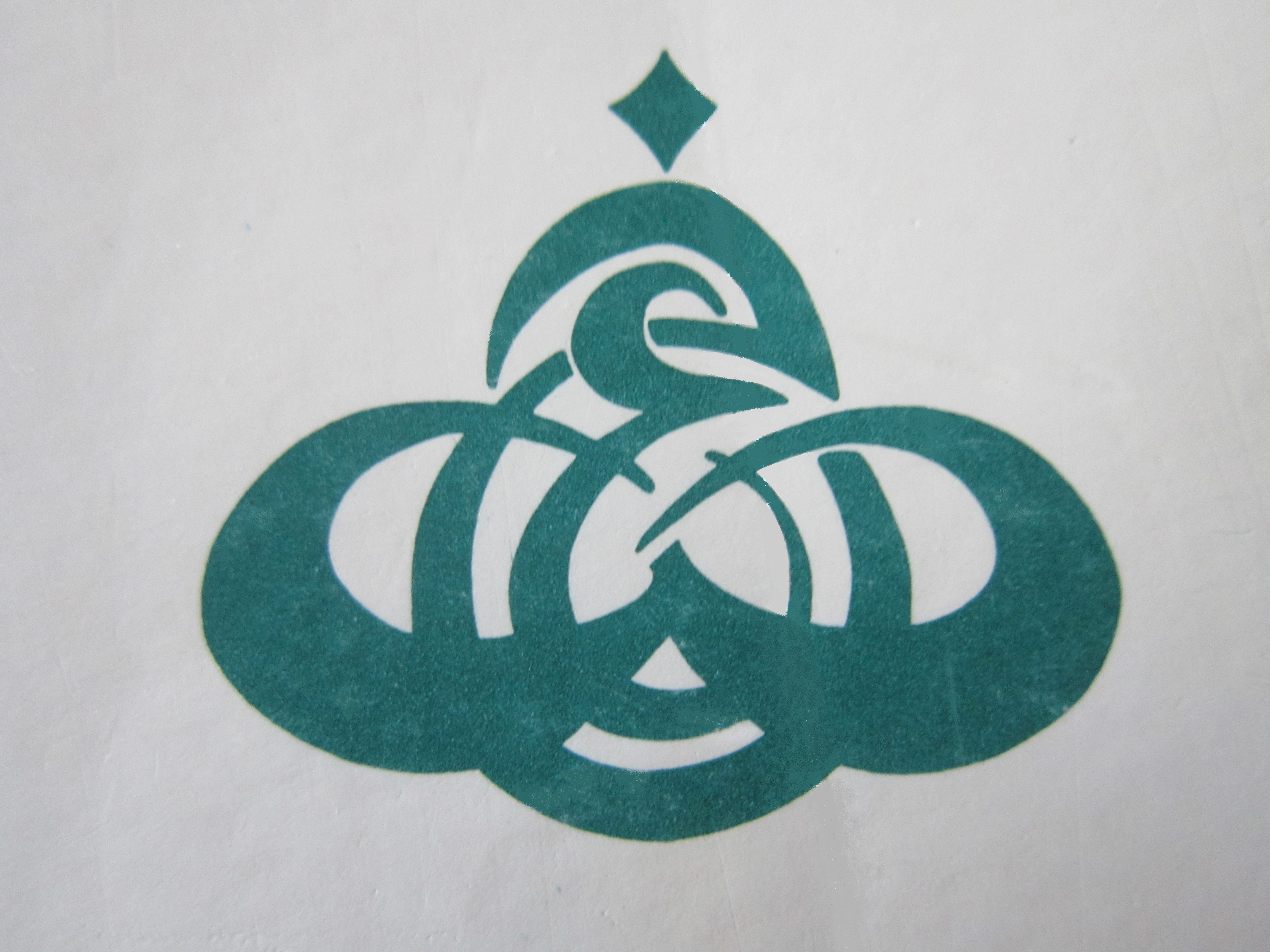 Logo Editions Sbihi